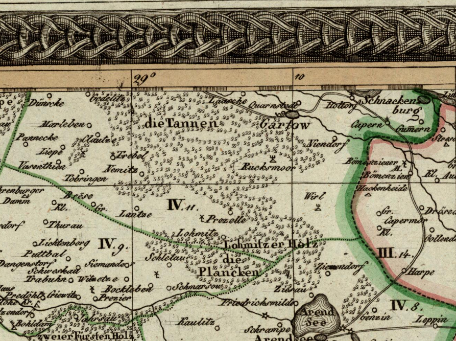 Der Kanton Gartow (1810-13) im Distrikt Salzwedel, Departement der Elbe, Königreich Westphalen